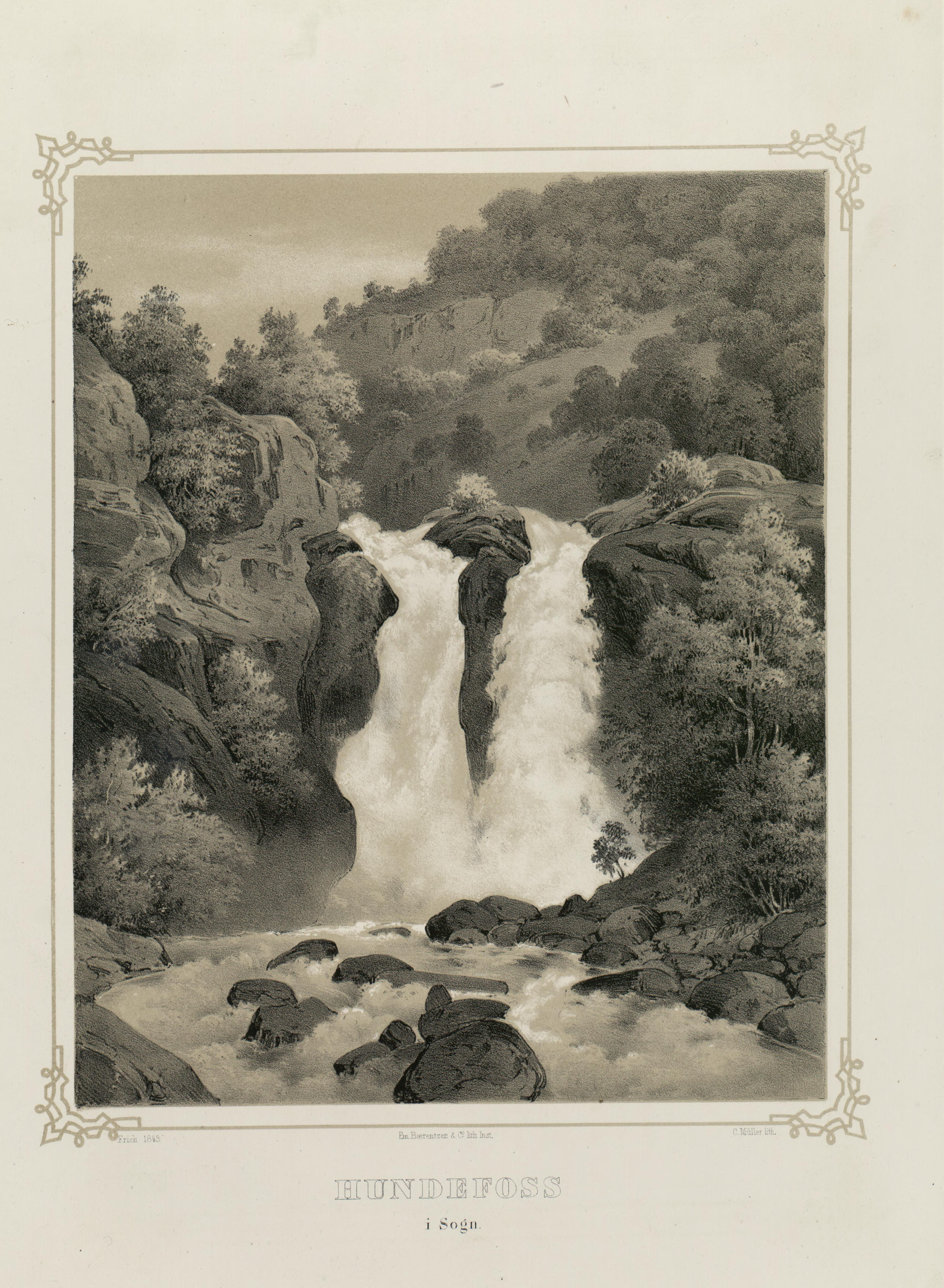 Illustrasjon hentet fra boken "Norge fremstillet i Tegninger" av Asbjørnsen, P.Chr. og utgitt av Chr. Tønsberg (no, 1848)